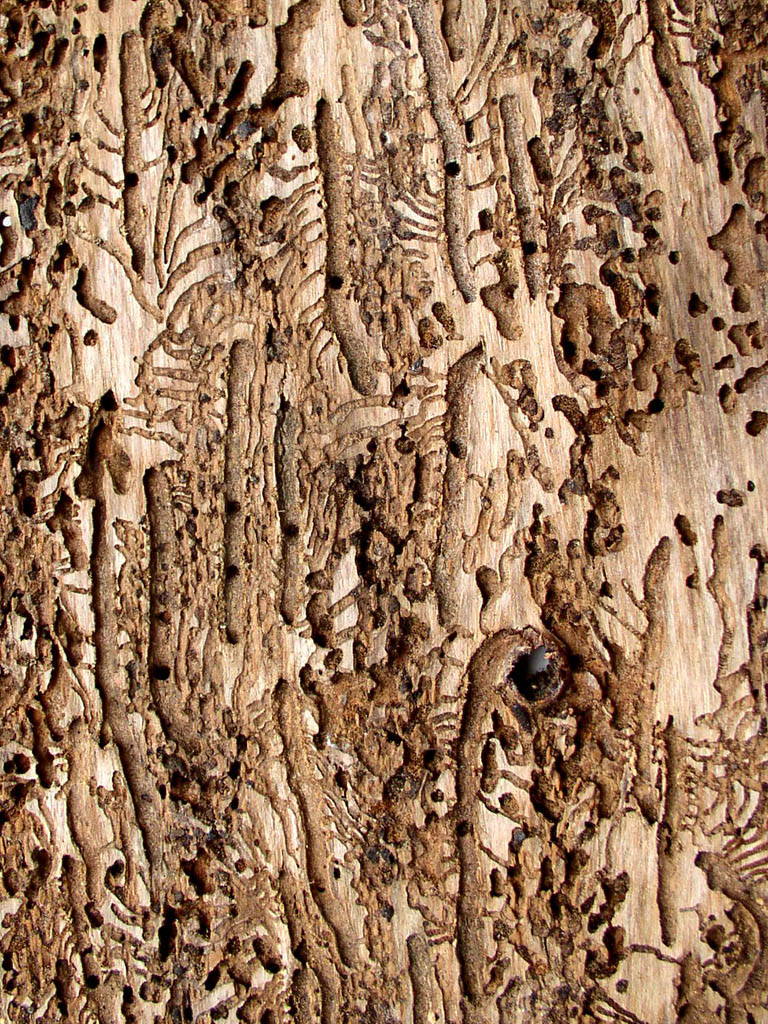 požerek lýkožrouta severského